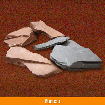 หินชนวน